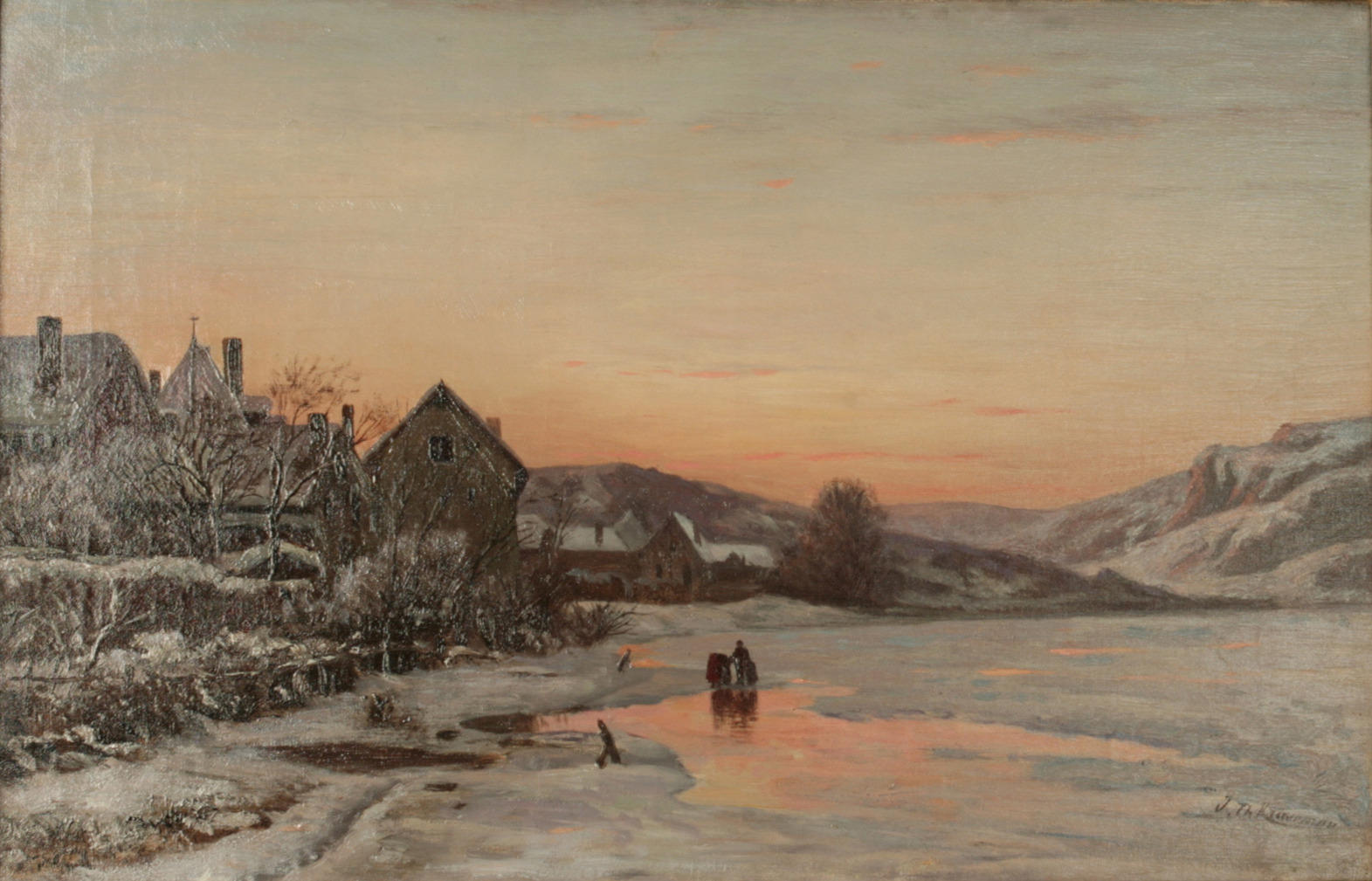 Soir d'Hiver à Anseremme sur Meuse, huile sur toile, 32,5 x 50 cm, signé à droite en bas et avec le titre au verso.